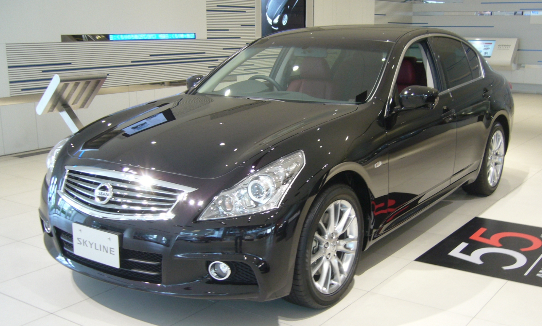 日産・スカイライン